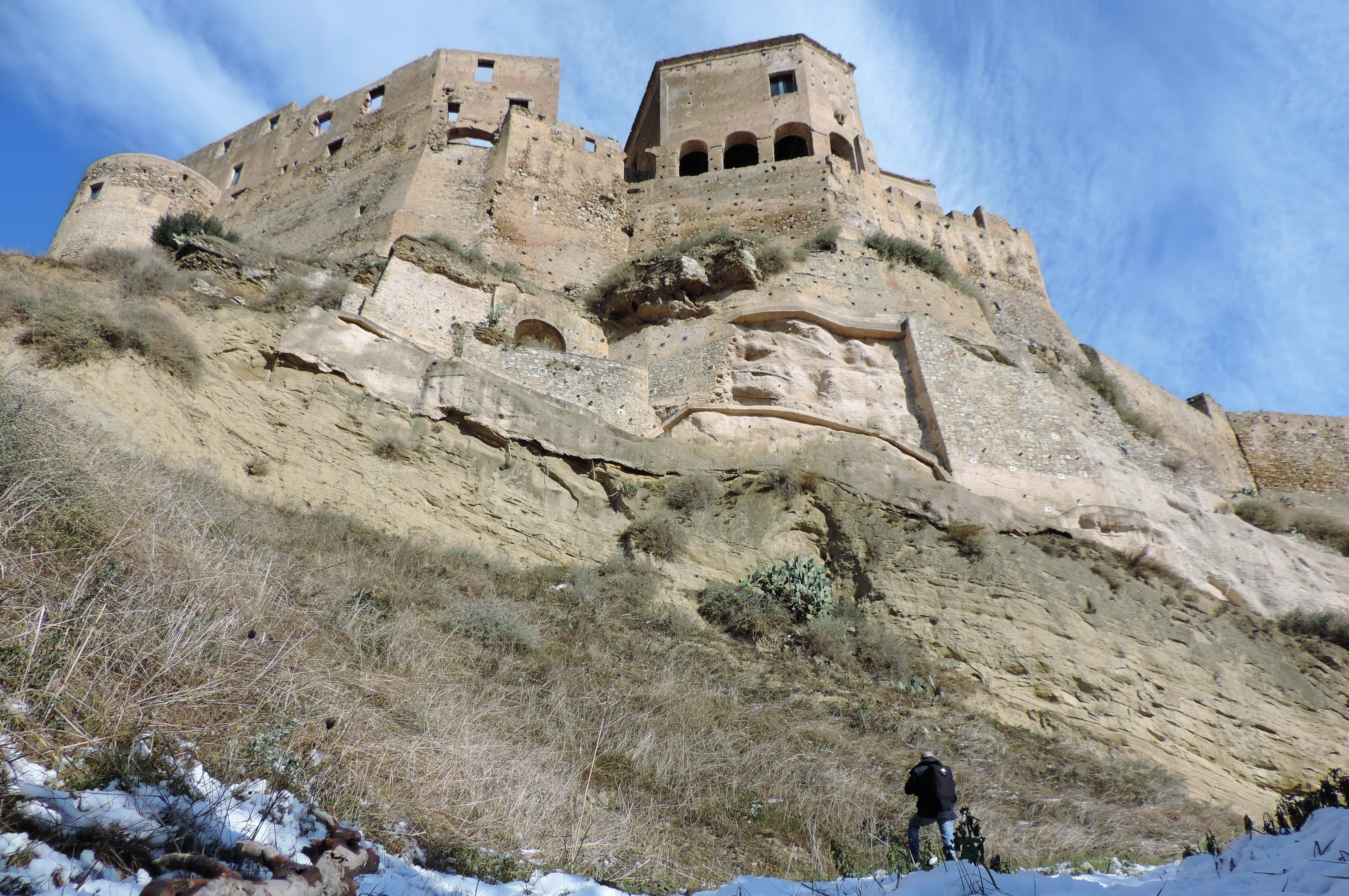 lato scosceso sud del castello svevo Rocca imperiale